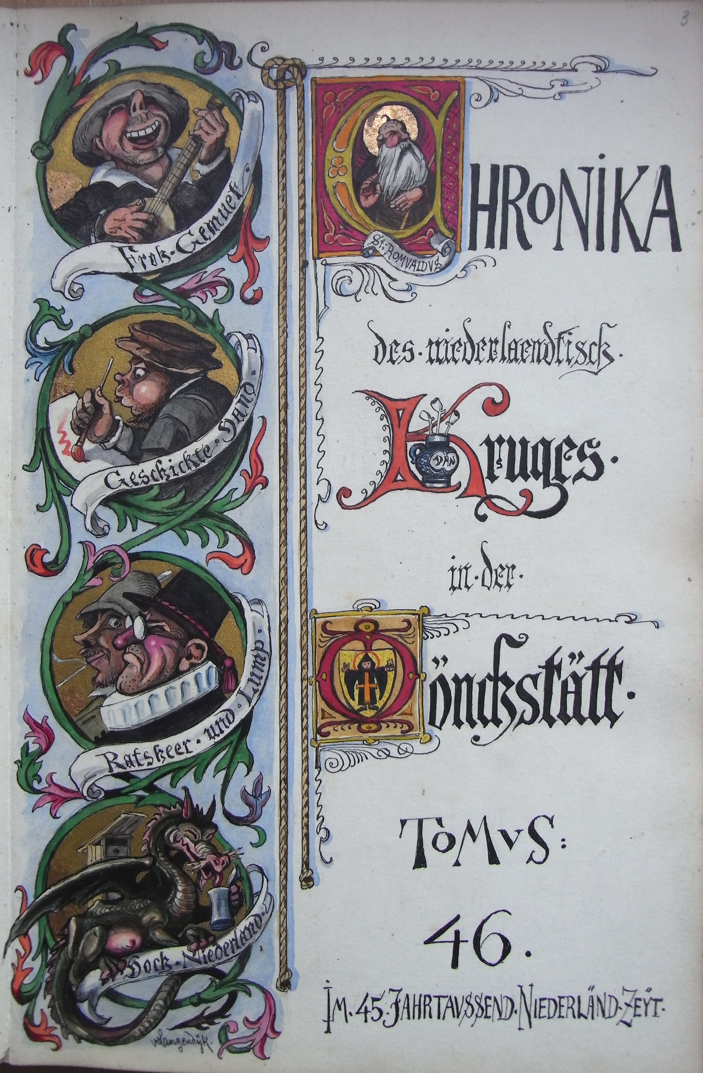 Chronikblatt der Societät Mönchstätt aus der Chronik der Societät Krug in München